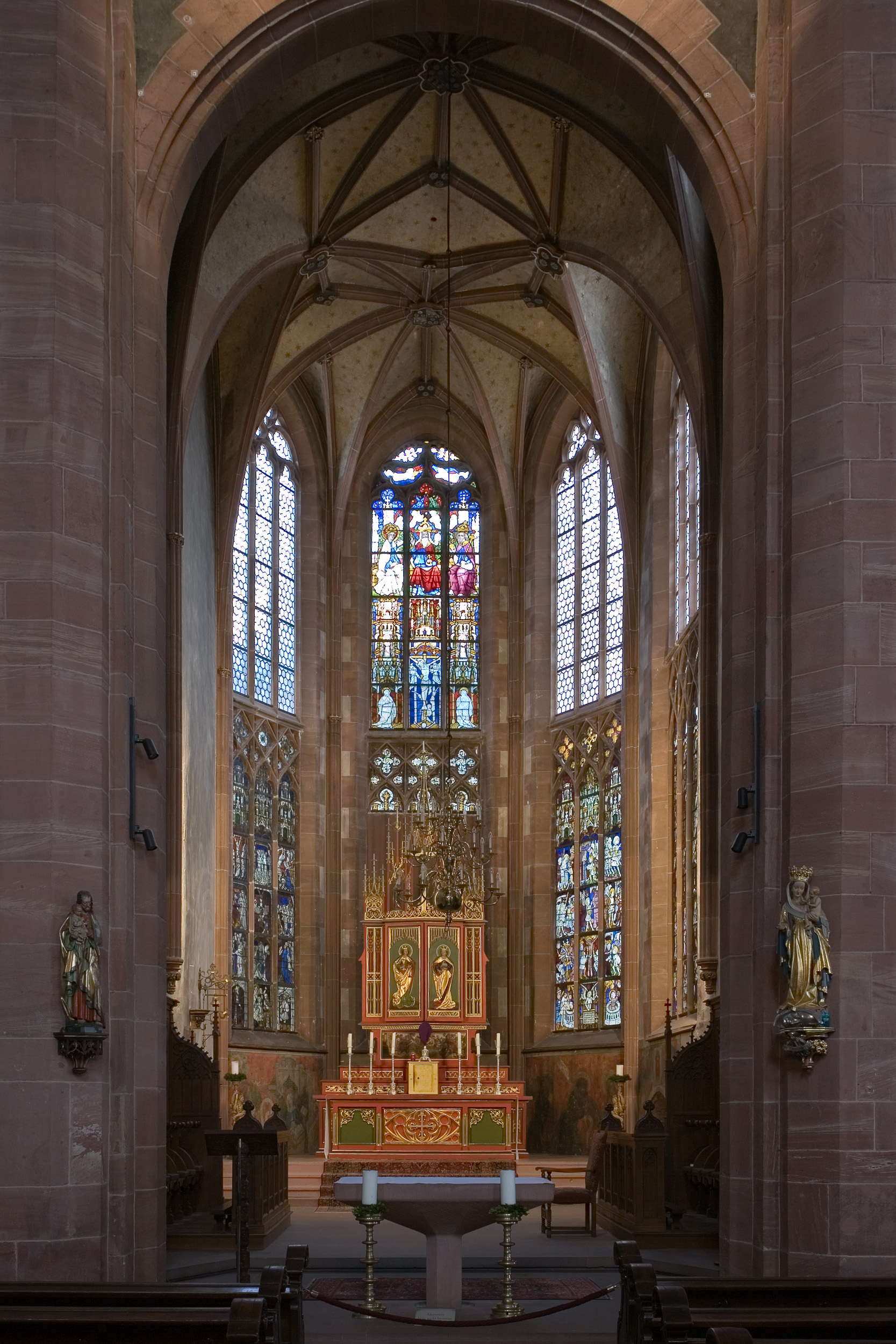 Hochchor der Leonhardskirche in Frankfurt am Main. Selber fotografiert im März 2008, Doppellizensierung GFDL & CC-BY-SA 2.5.